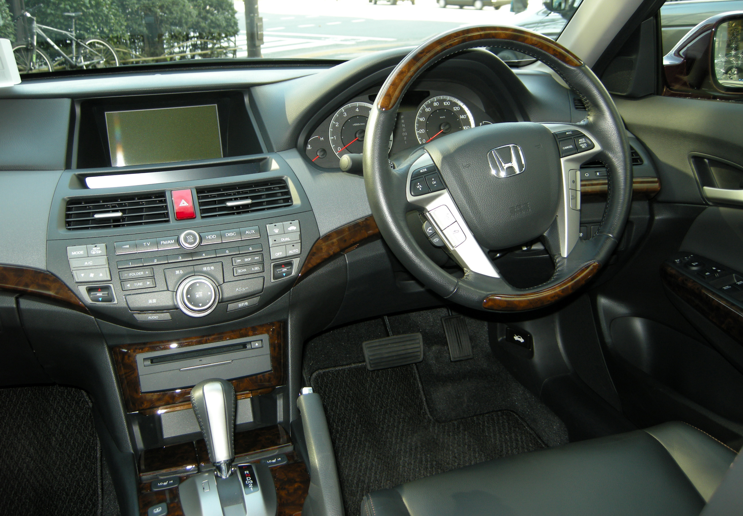 2008 Honda Inspire Interior